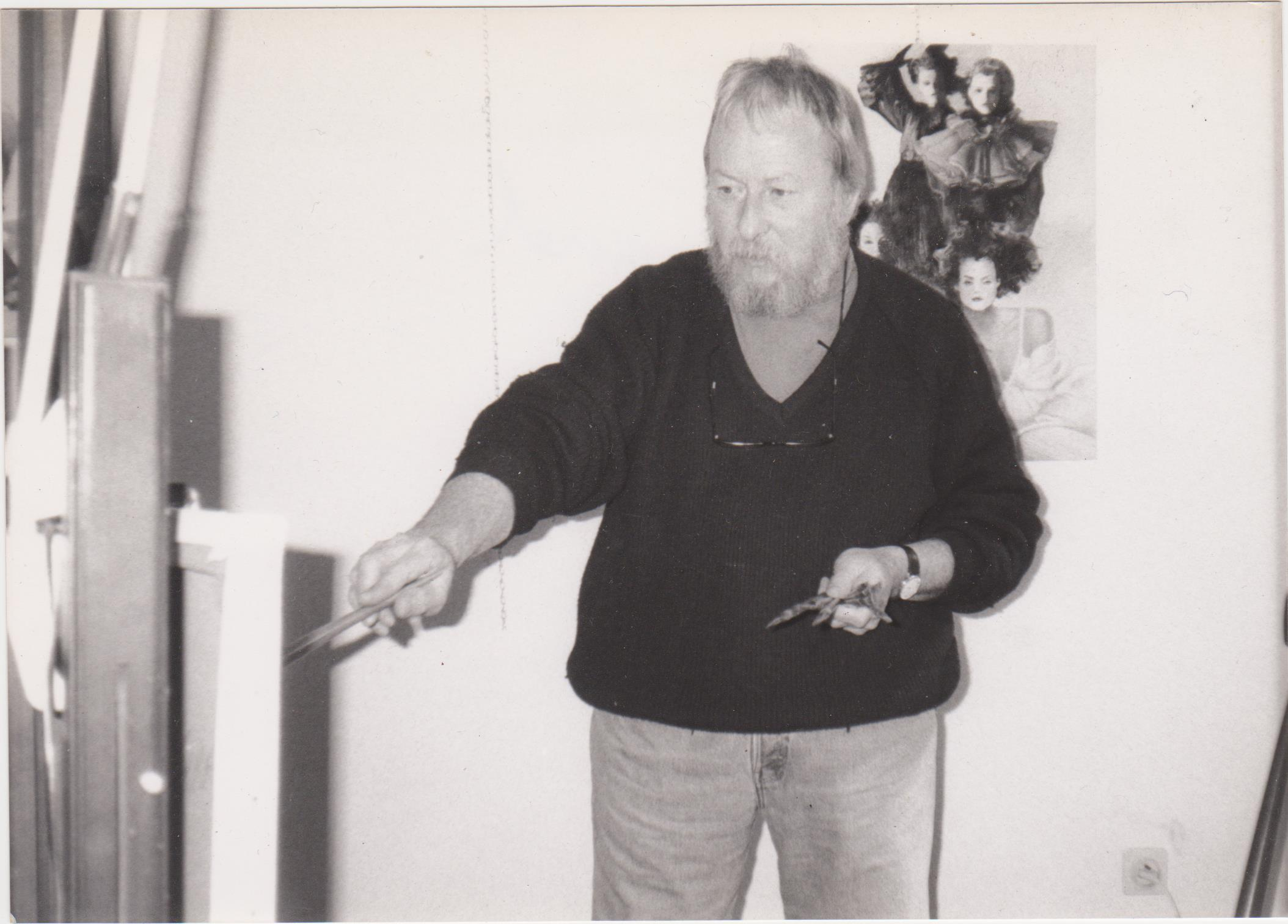 Pierre Jarraud : la passion de la peinture.